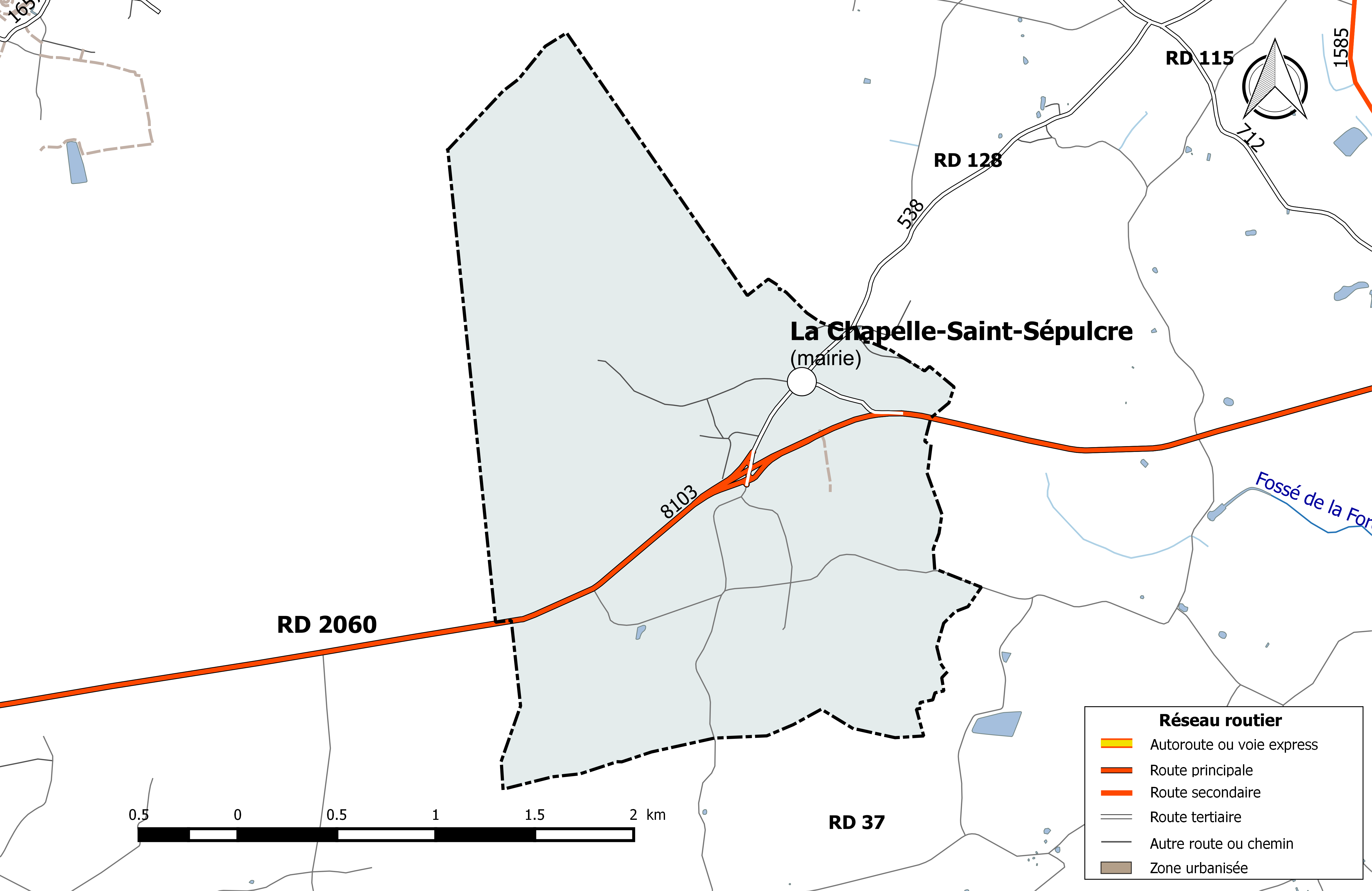 Carte du réseau routier de la commune de La Chapelle-Saint-Sépulcre.